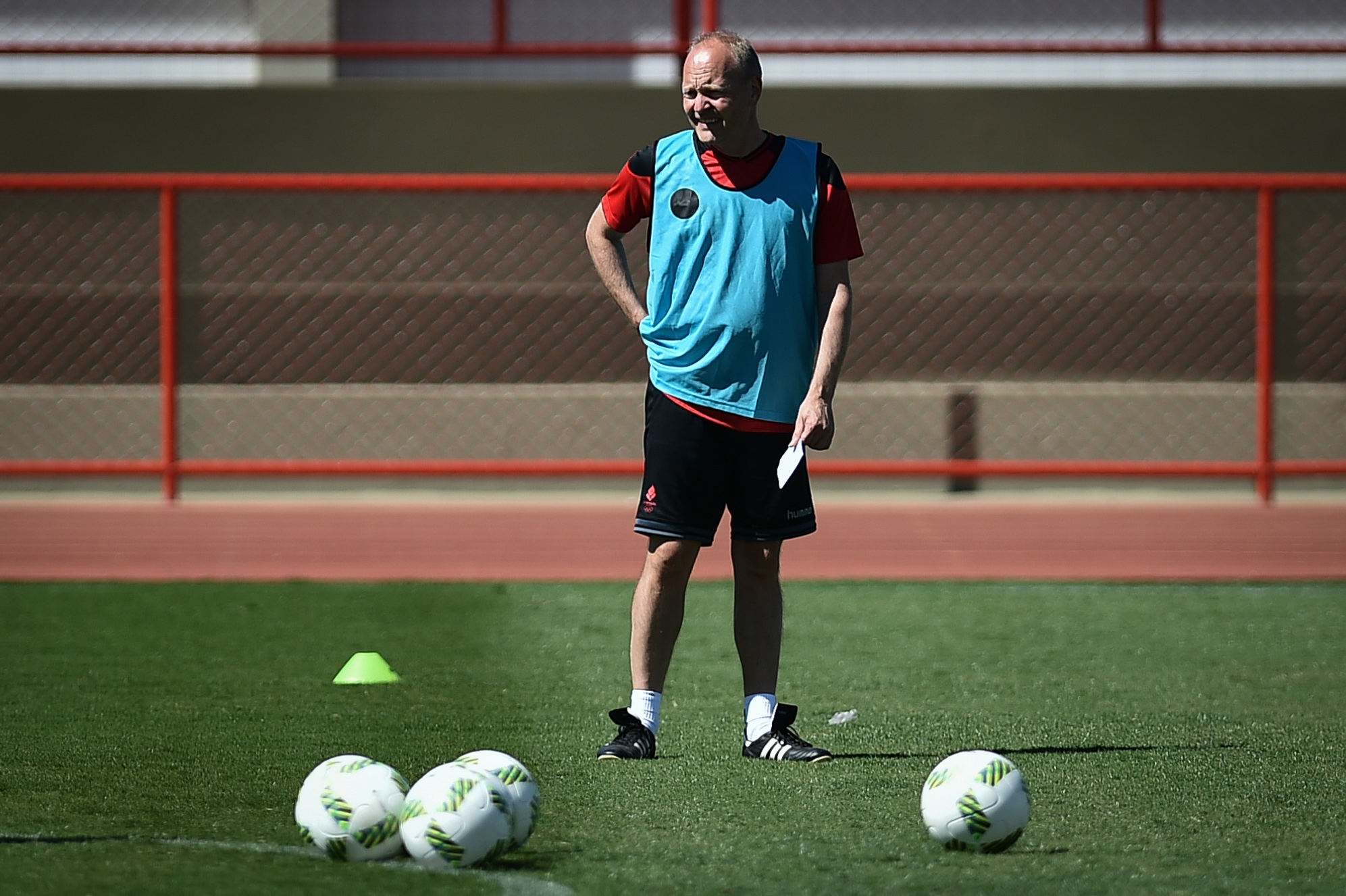 Centro de Capacitação Física do Corpo de Bombeiros Militar, Setor Policial Sul, Brasília, DF, Brasil 2/8/2016 Foto: Andre Borges/Agência Brasília. A seleção olímpica de futetbol masculina da Dinamarca treinou na tarde desta terça-feira (2) no Centro de Capacitação Física do Corpo de Bombeiros Militar, Setor Policial Sul.